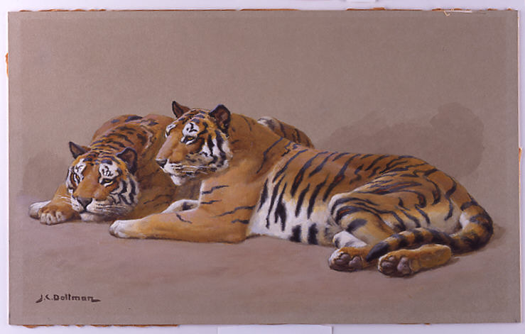 British; Drawing; Drawings